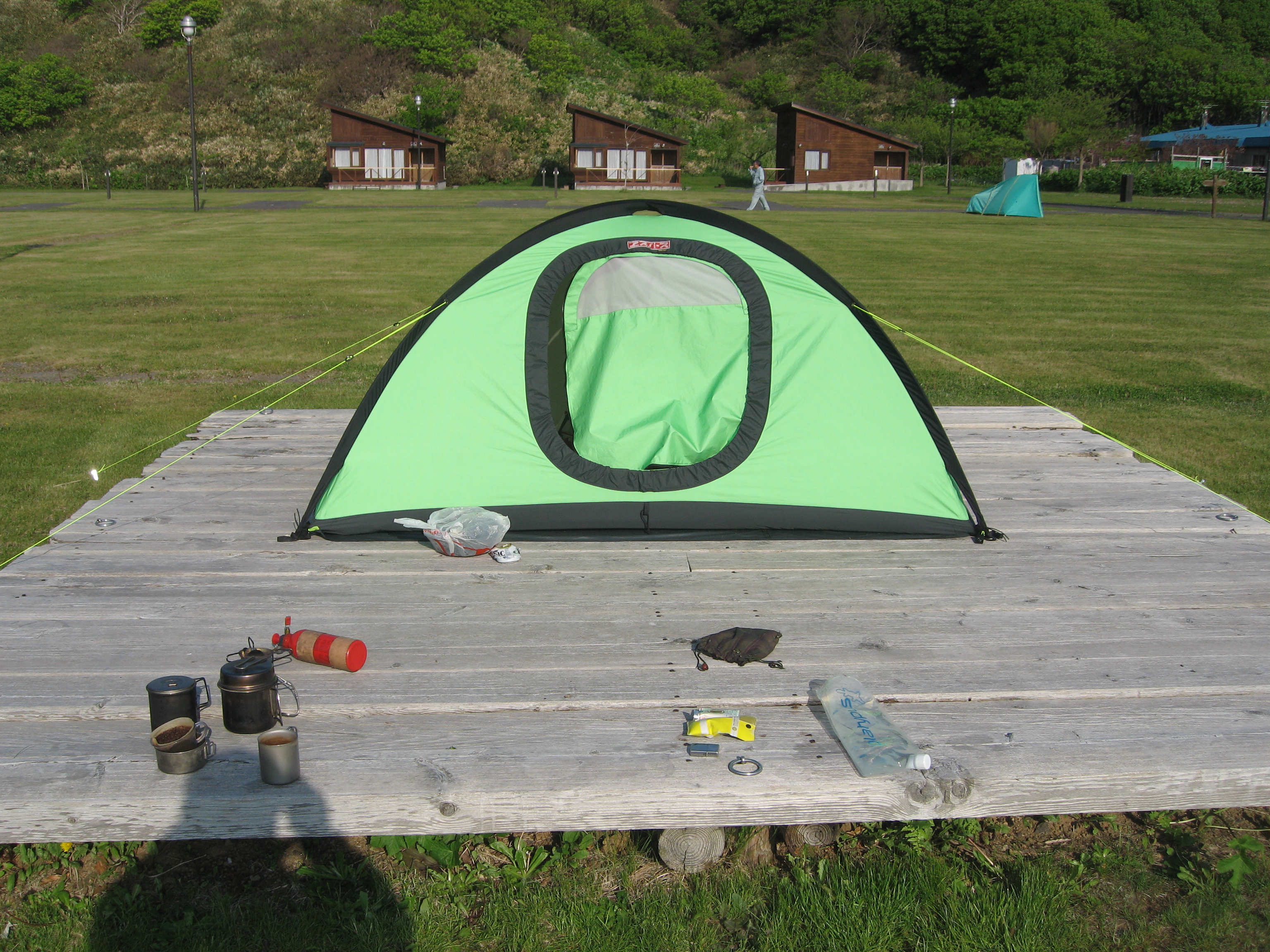 エスパースのシングルウォールテント